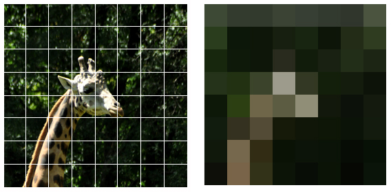 Proceso de representación del color de una imagen para su DDC (Descriptor de la Distribución del Color).